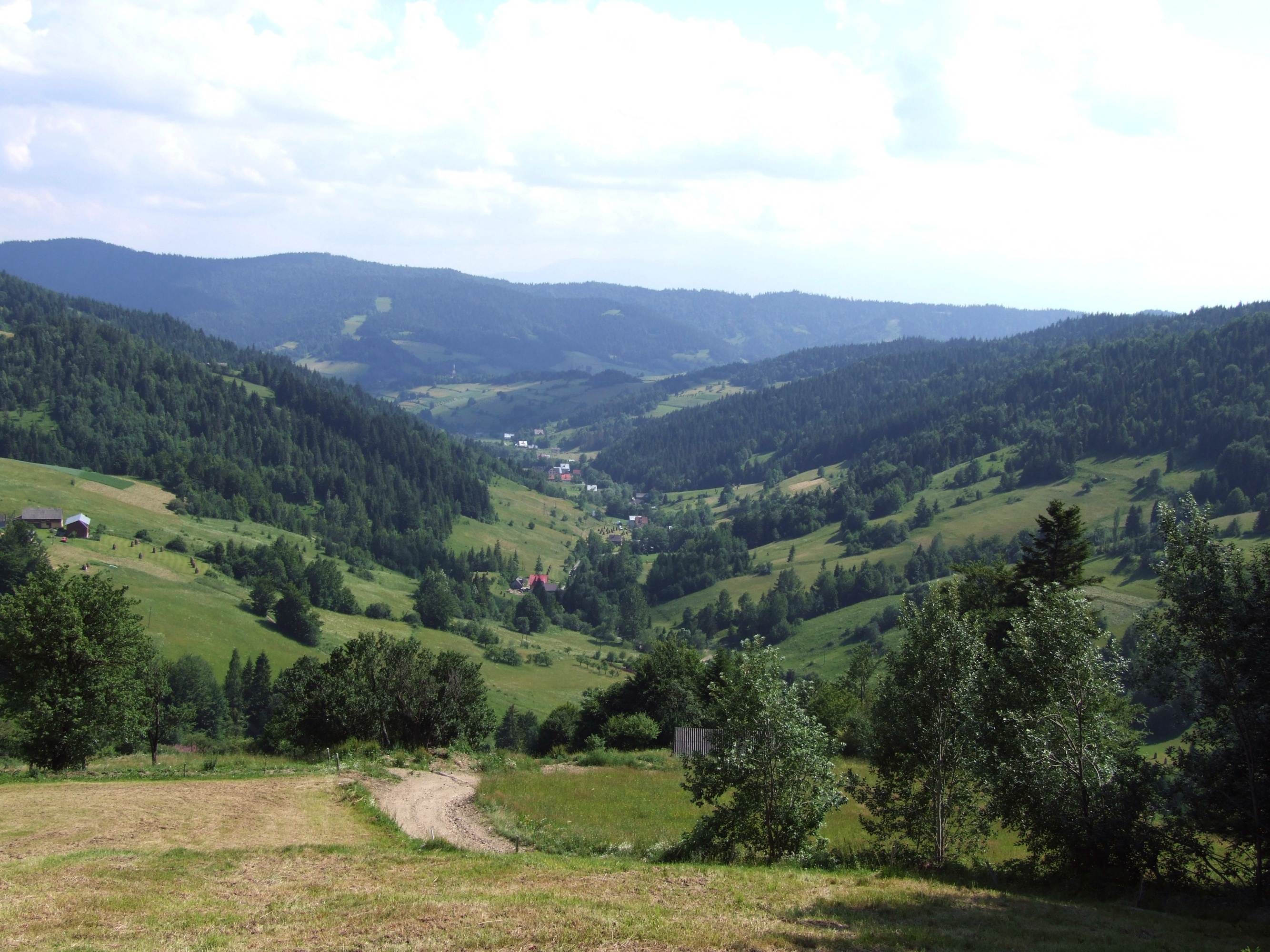 Dolina Potoku Jamne w Ochotnicy Górnej